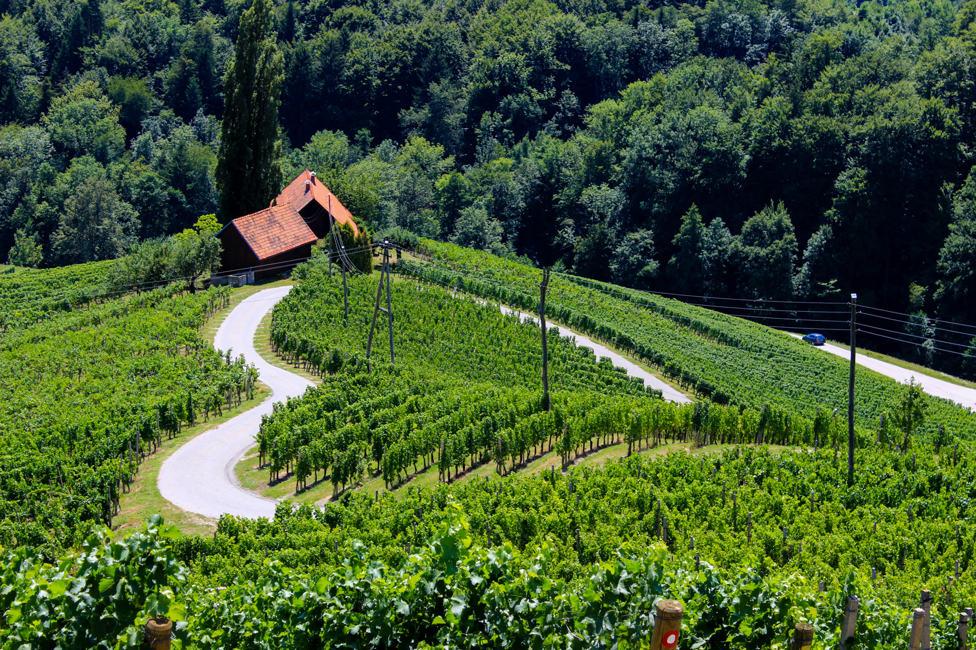 Špičnik